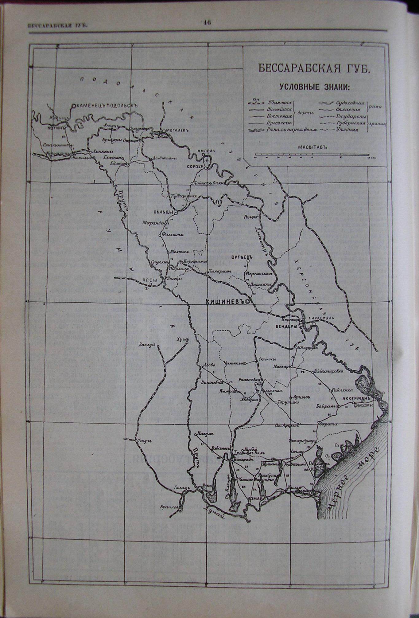 Стр. 46 из адрес-календаря Российской империи "Вся Россия", 1902.